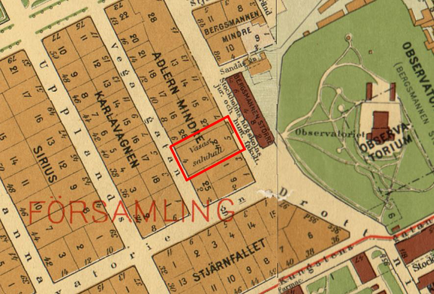 Del av Stockholmskarta visande kvarter Adlern mindre med Vasas Saluhall